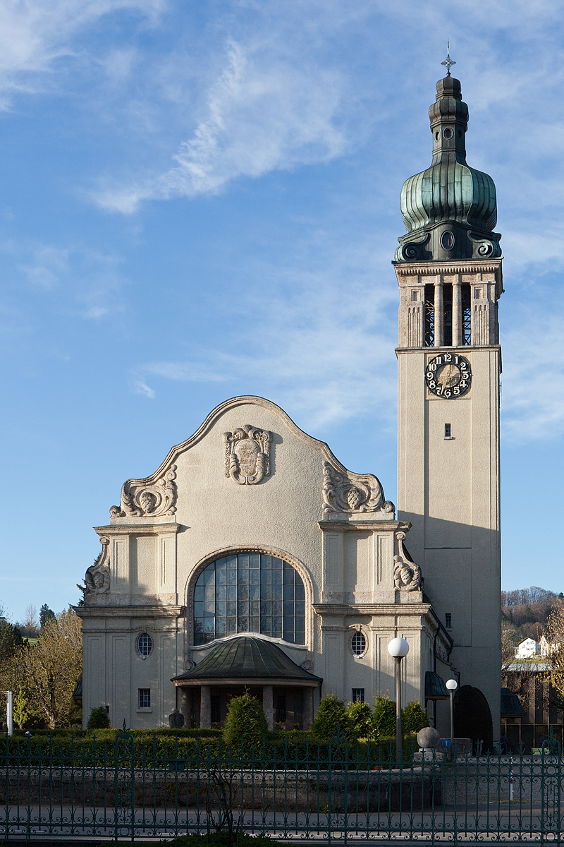 Reformierte Kirche (1911) in Flawil (SG)